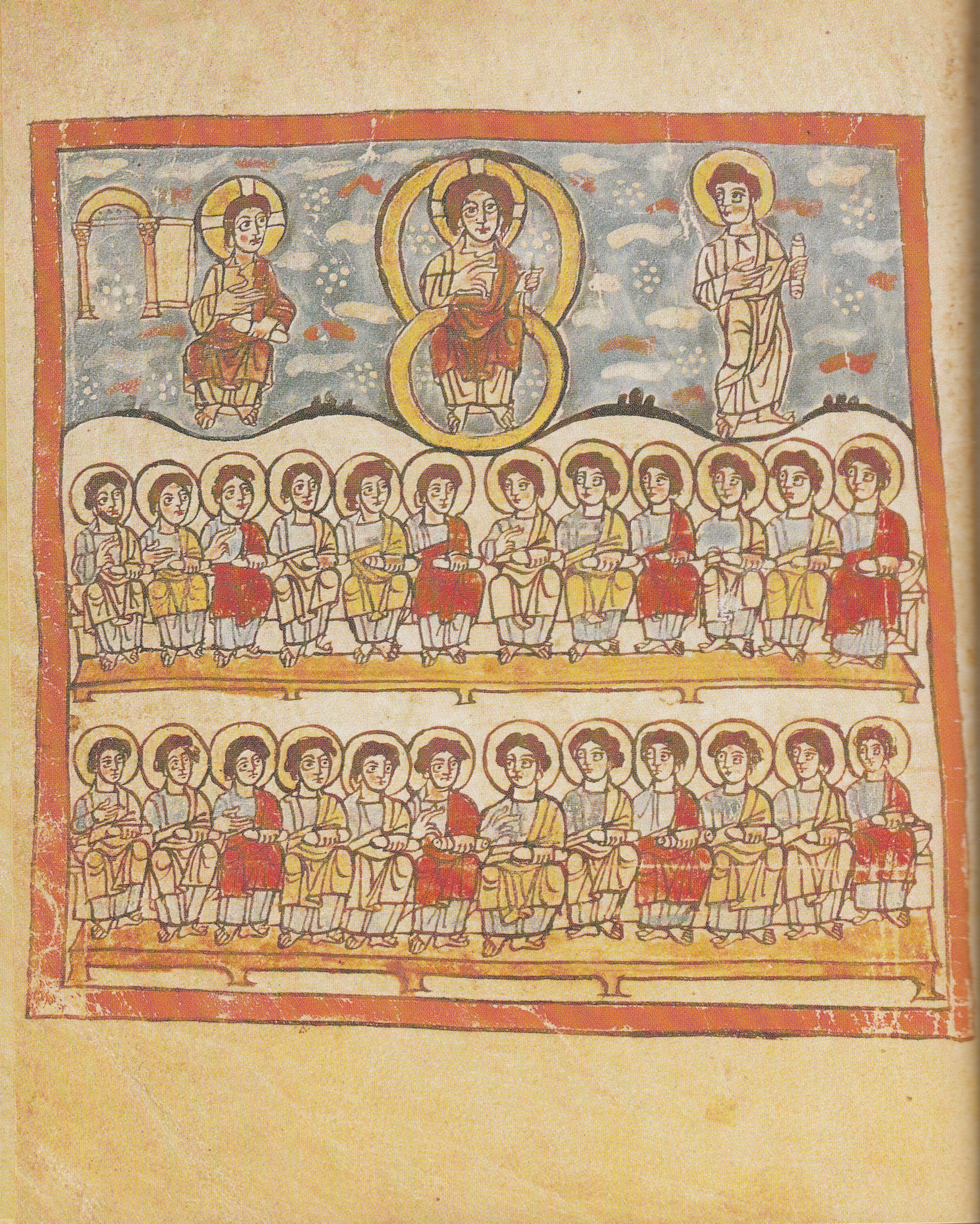 Botschaft an die Gemeinde von Philadelphia